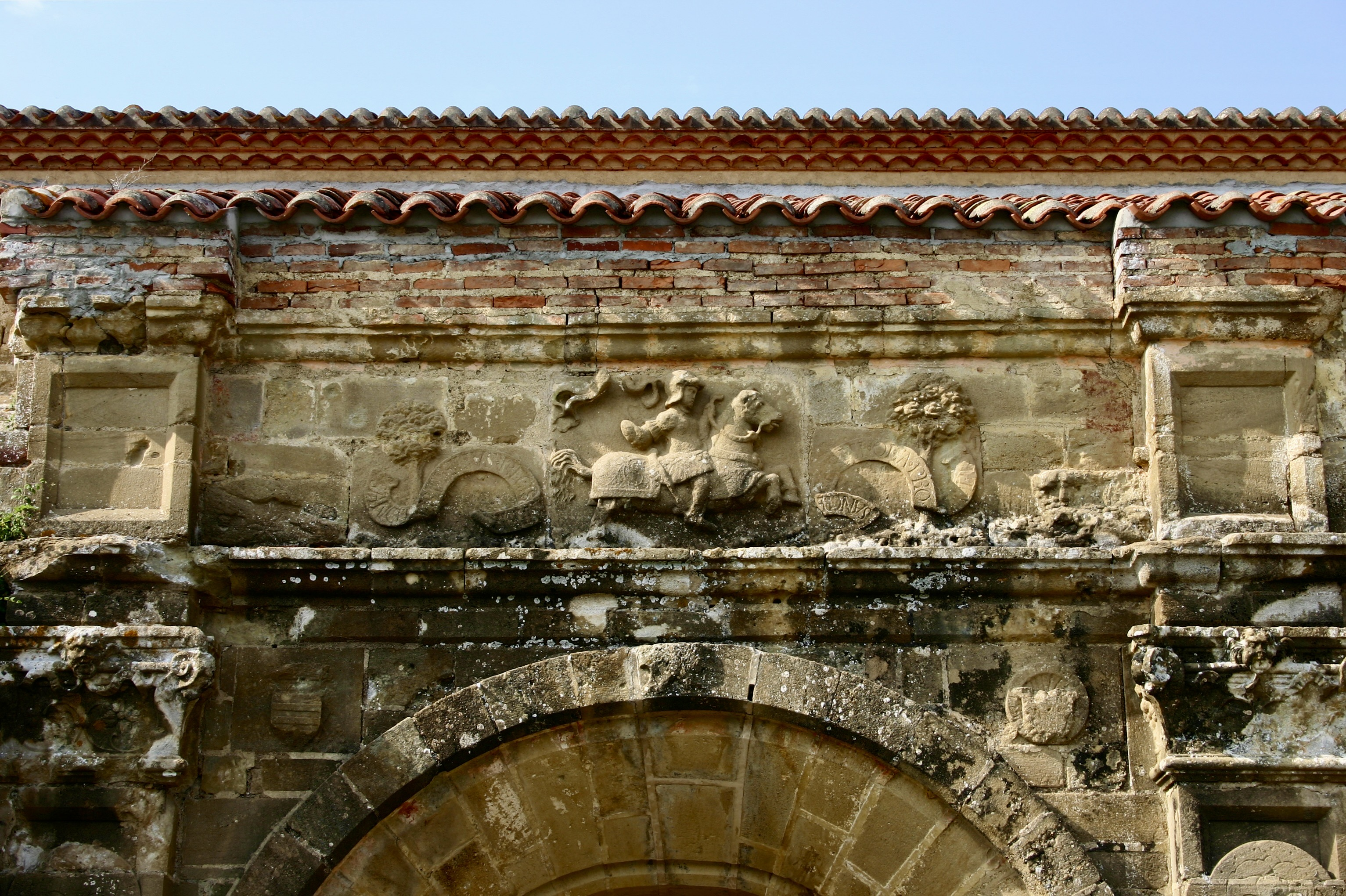 Détail de la porte et du linteau Renaissance de la basilique Saint-Fris de Bassoues (département du Gers, France). Copyright (c) 2006 David Farreny. Permission vous est donnée de copier, distribuer et/ou modifier ce document selon les termes de la Licence GNU Free Documentation License, Version 1.2 ou ultérieure publiée par la Free Software Foundation ; sans sections inaltérables et sans pages de couverture. [1] Permission is granted to copy, distribute and/or modify this document under the terms of the GNU Free Documentation License, Version 1.2 or any later version published by the Free Software Foundation; with no Invariant Sections, no Front-Cover Texts, and no Back-Cover Texts. [2]